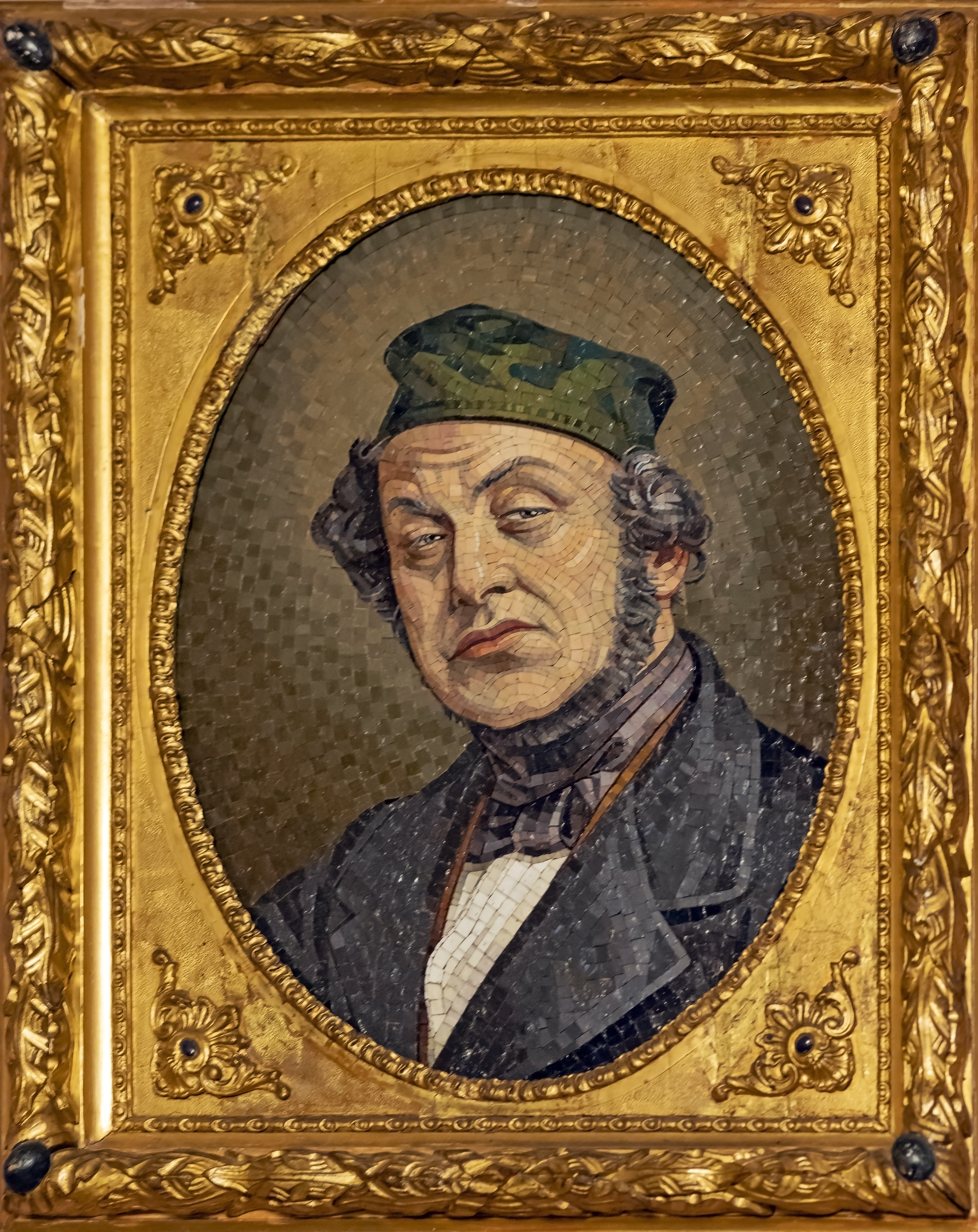 Depicted person: Giovanni Querini Stampalia